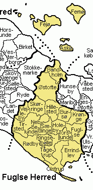 Fuglse Herred Maribo Amt , Denmark.